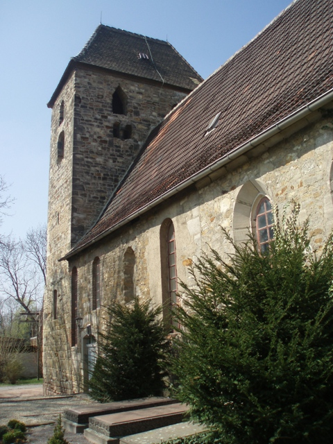 Kirche in Röcken mit Familiengrab Nietzsche